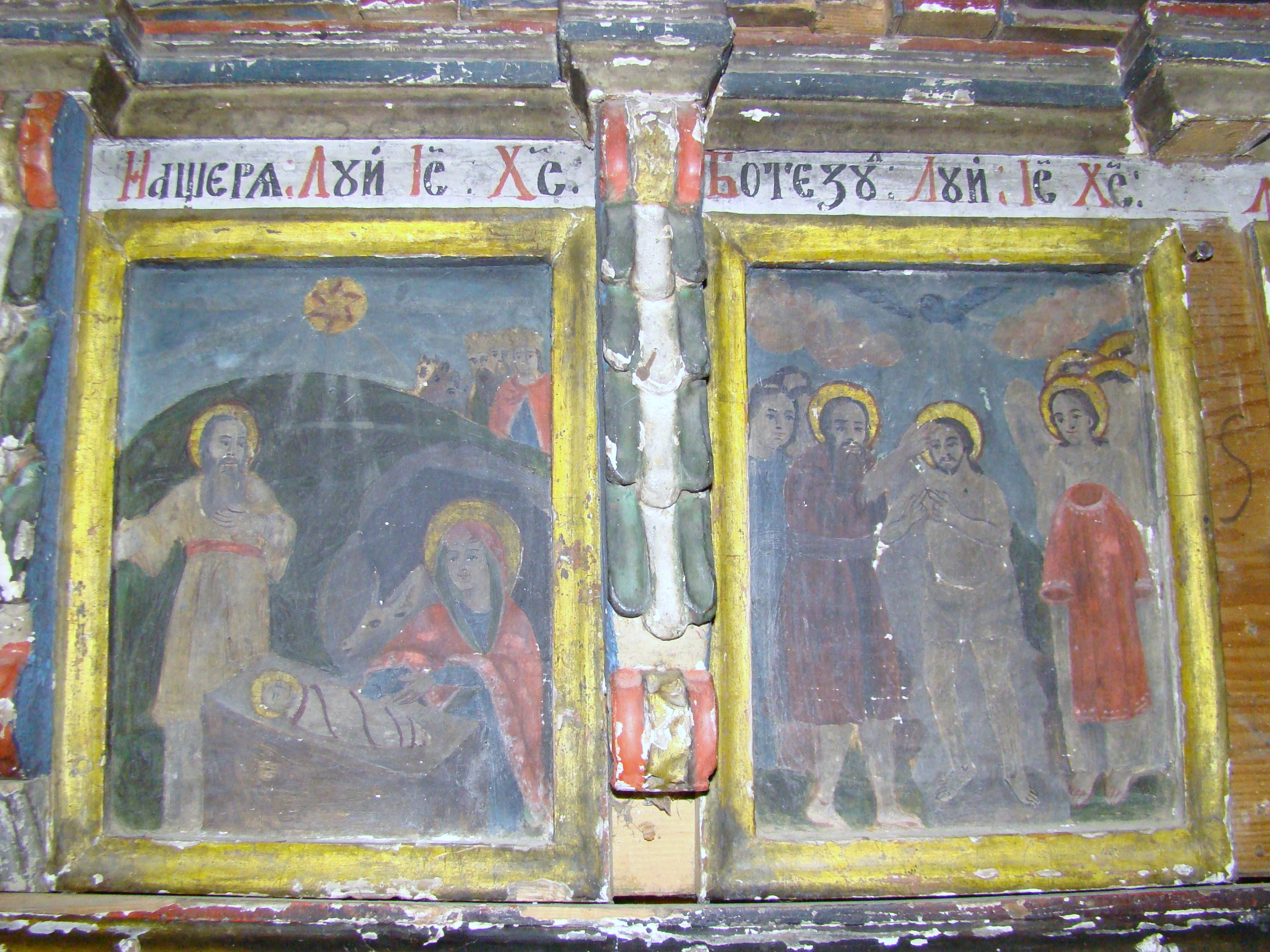 Biserica de lemn "Adormirea Maicii Domnului" a fostei mănăstiri "Izvoru Negru" , sat MOISEI 01